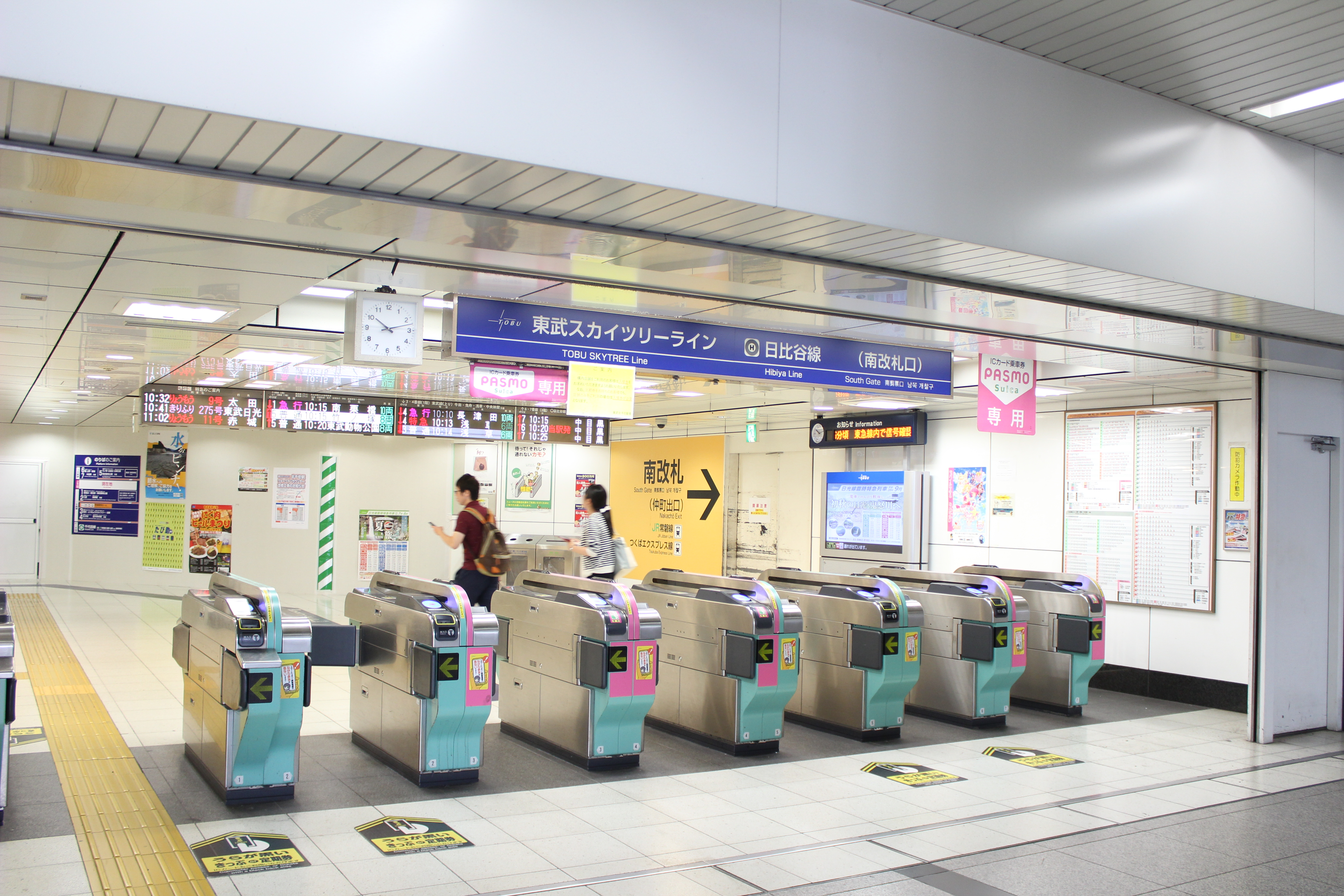 東武北千住駅南改札口